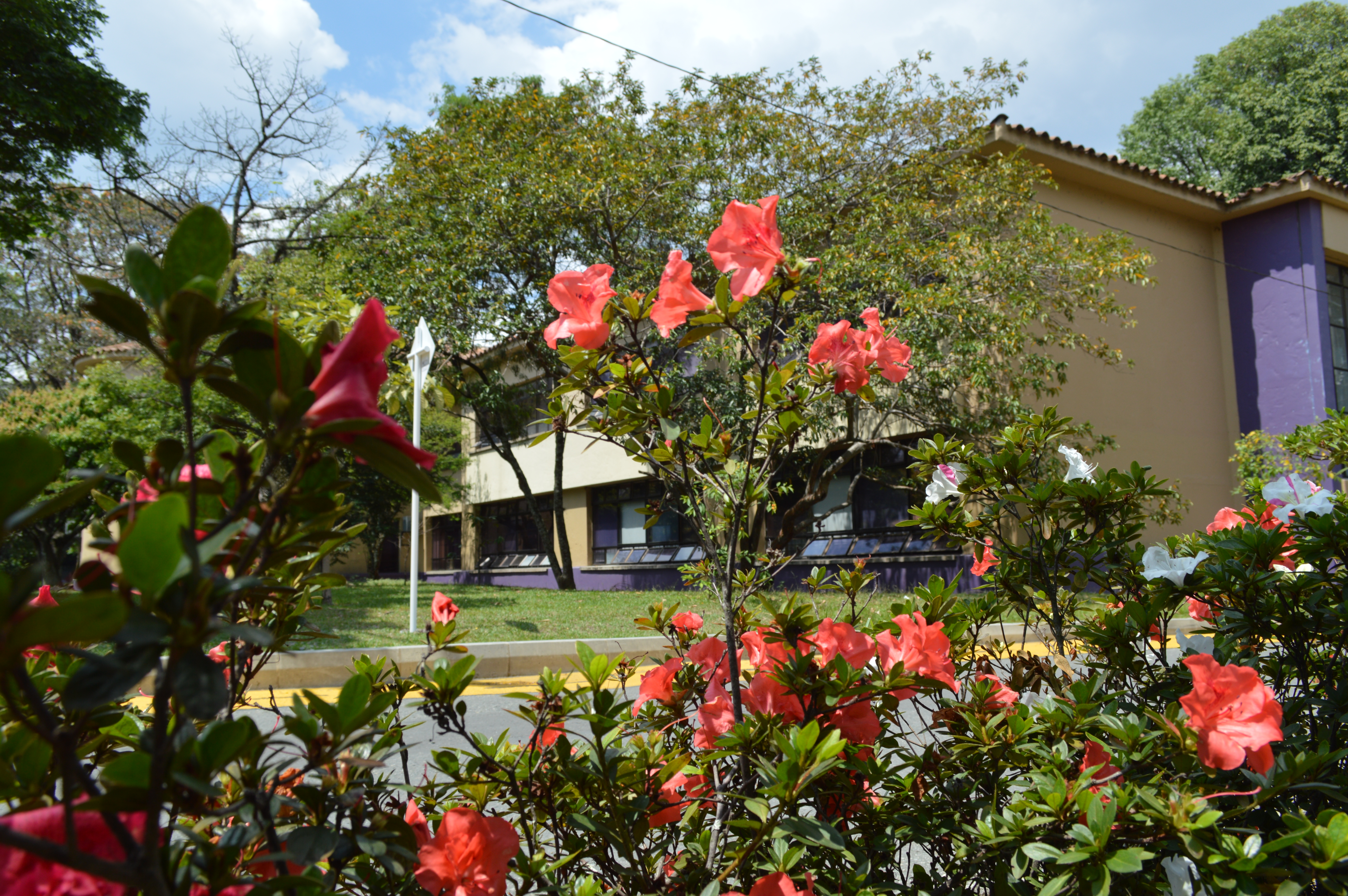 Foto lateral